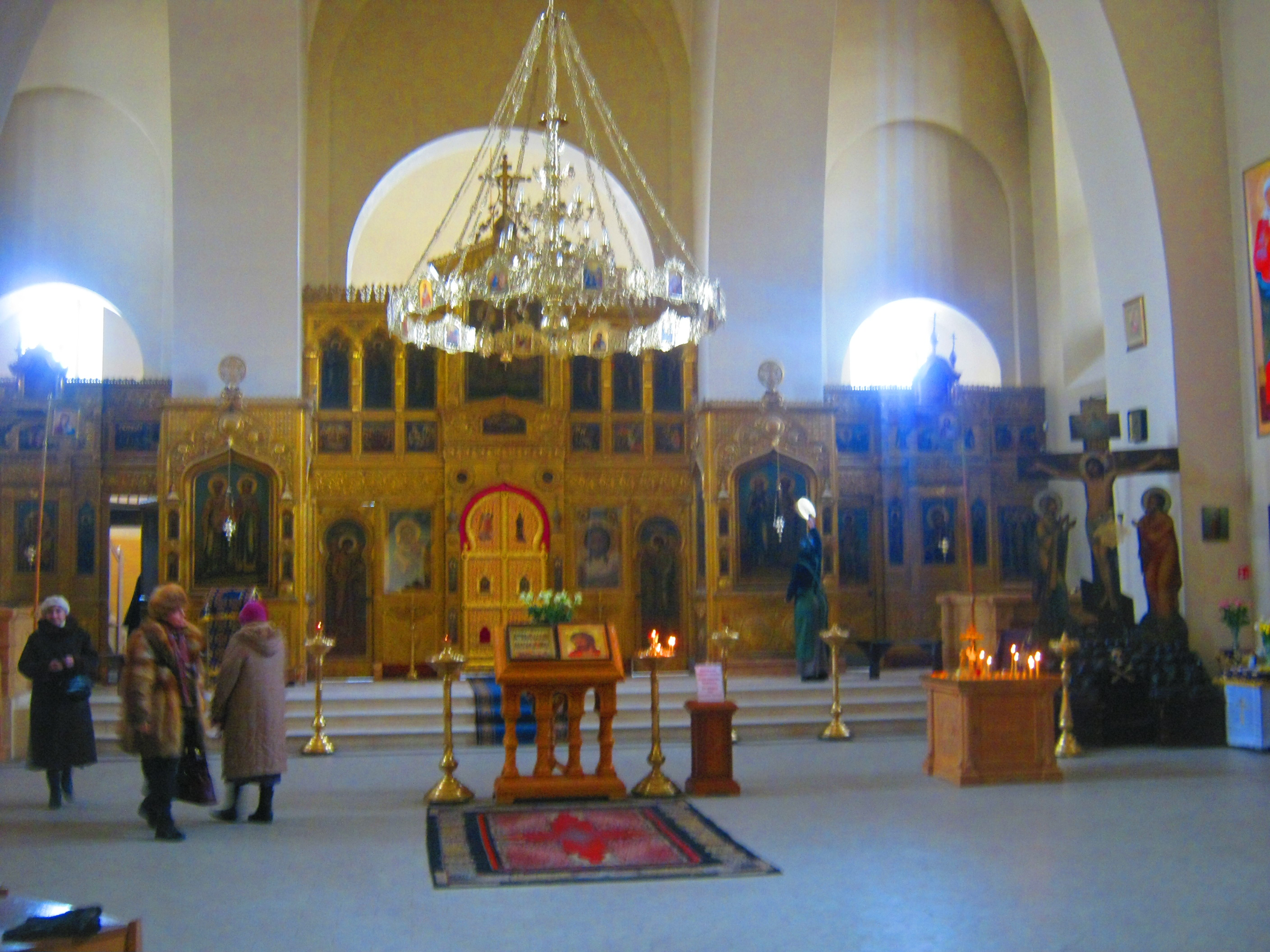 Vilniaus Šv. Konstantino ir Michailo cerkvė